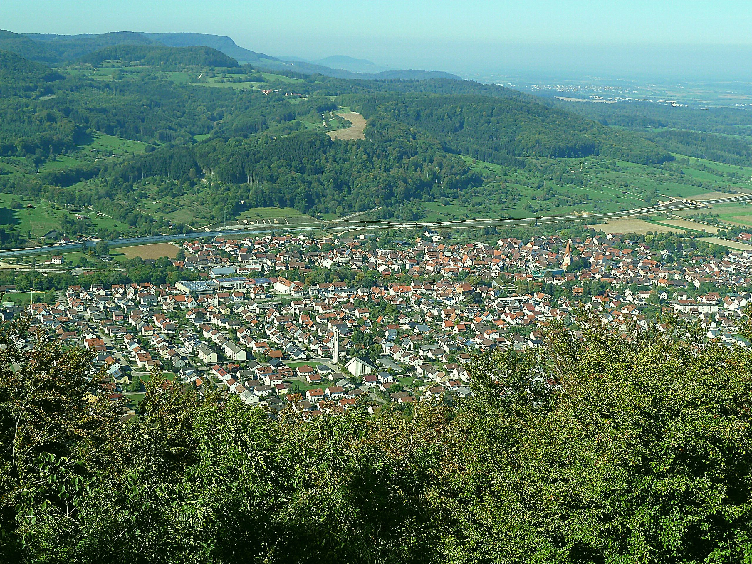 Blick auf Gingen an der Fils vom Hohenstein